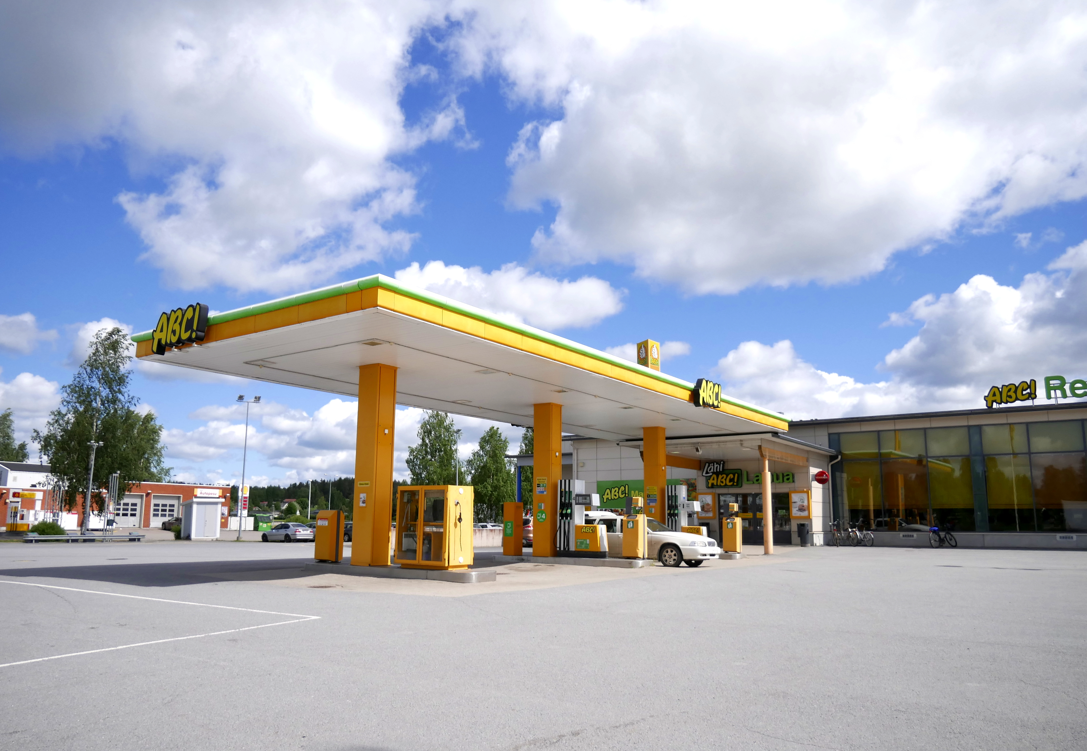 ABC Lapua.